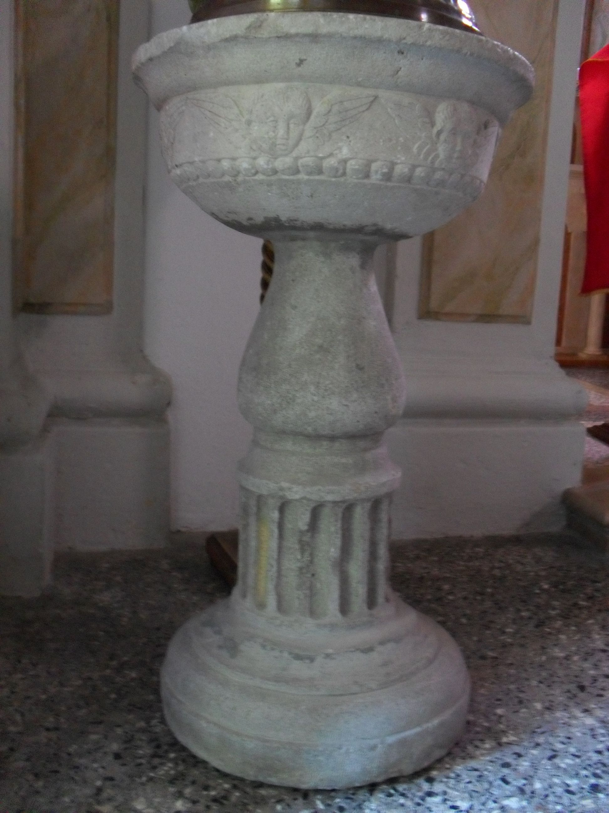 Chiesa di Rosa (San Vito al Tagliamento: fonte battesimale scolpita da Giovanni Antonio Pilacorte